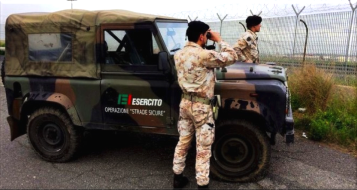 ’Autovettura da Ricognizione Land Rover Defender "AR 90" veicolo tattico off road destinato ad operare con tutte le unità della F.A. Ha un grado di mobilità tale da consentire il superamento di terreni a basso indice di scorrimento. E’ un veicolo destinato ad attività di Comando e Controllo, ricognizione e supporto ravvicinato. Può raggiungere la velocità max di 110 Km/h su strada ed ha una capacità di traporto di 5 uomini equipaggiati più il conduttore. ed è impiegata largamente per attività addestrative ed operative sul territorio nazionale.​​